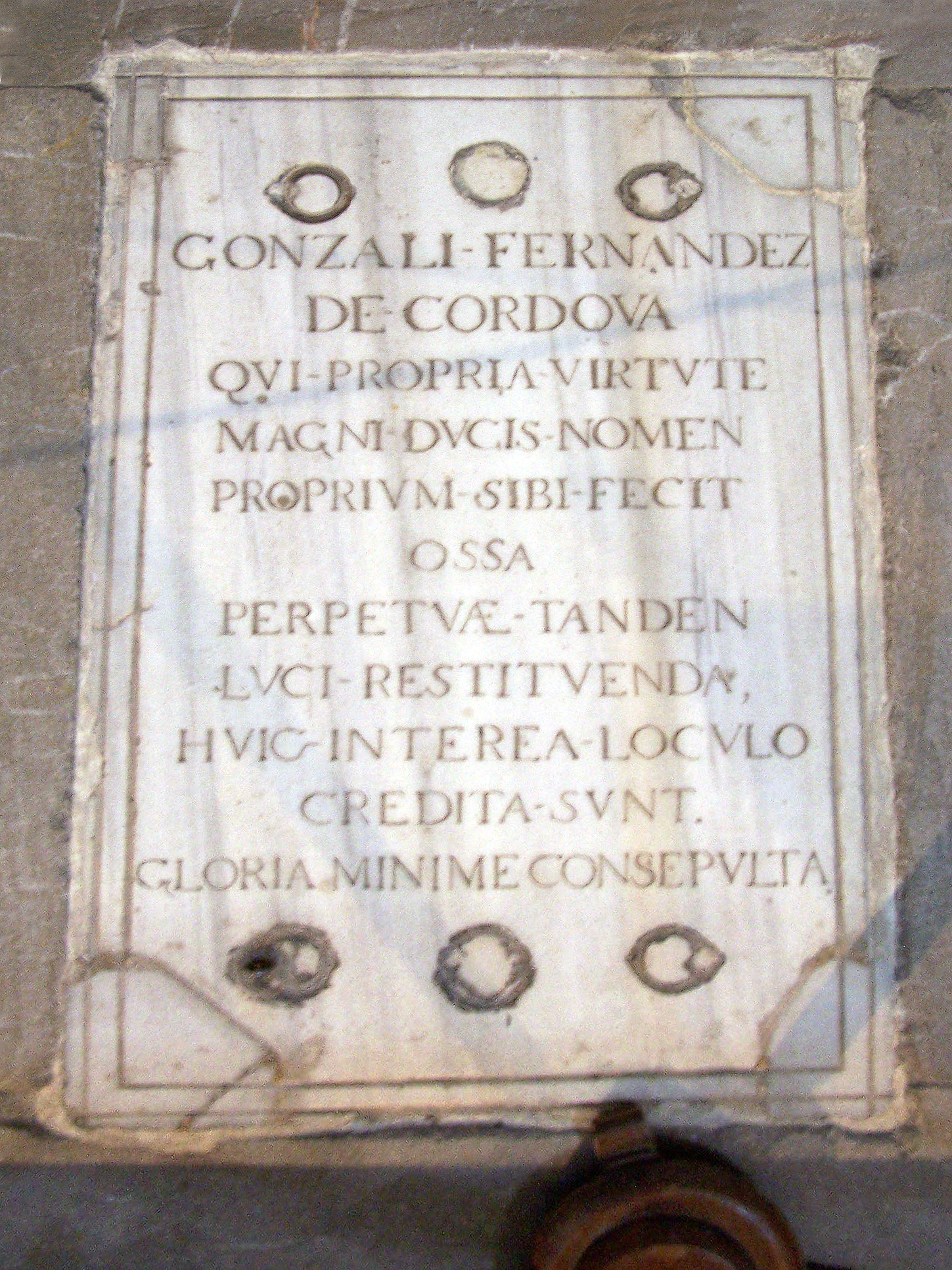 Lápida de la tumba del Gran Capitán situada ante la escalinata del altar mayor de la iglesia del monasterio de San Jerónimo en Granada.